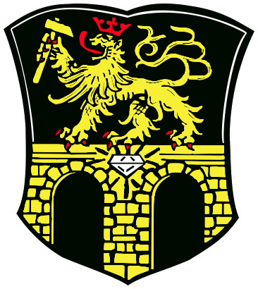 Das Wappen zeigt zunächst die Brücke als redendes Symbol für den Ortsnamen. Brücken war kurpfälzisch, seit 1779 pfalz-zweibrückisch; hierfür stehen der Löwe und die Wappenfarben. Bergwerkshammer und Diamant sind Zeichen der früher blühenden Wirtschaftszweige des Kohlenbergbaus, danach der Diamantschleiferei..